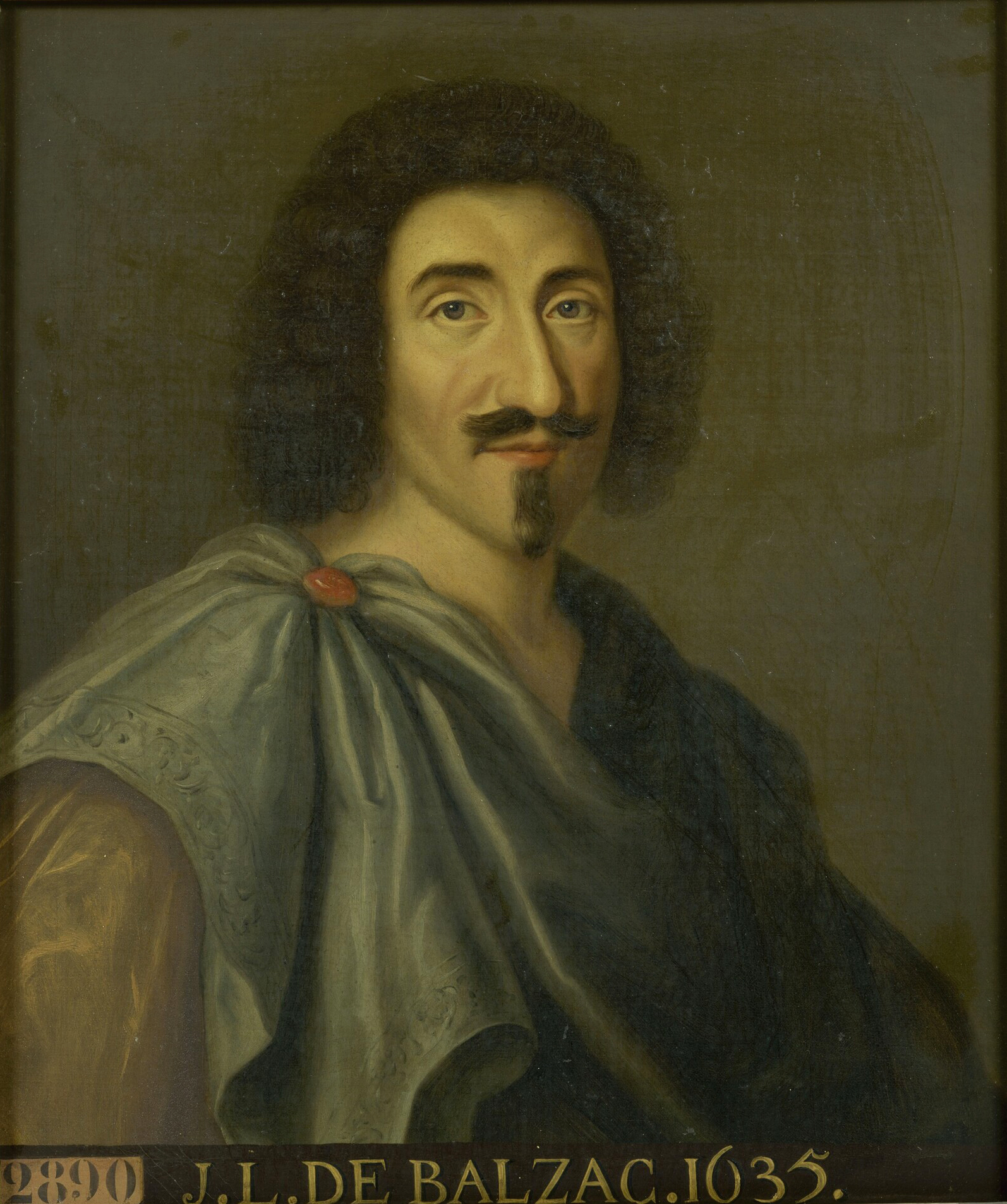 Jean-Louis Guez de Balzac (1594-1655), French author.